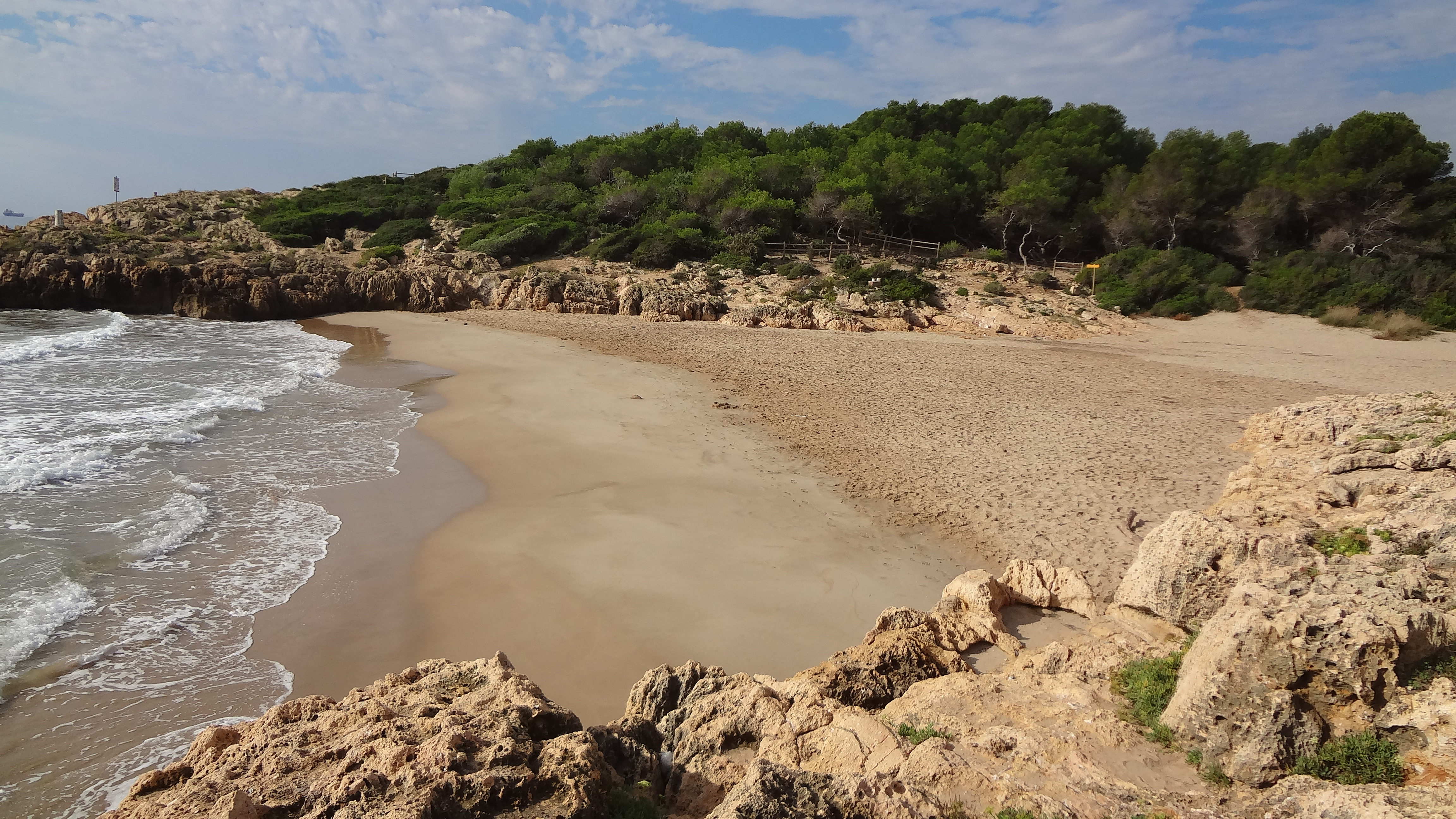 Platja dels Capellans (Tarragona) This is a a photo of a beach in Catalonia, Spain, with id: PL-CT-17003-309